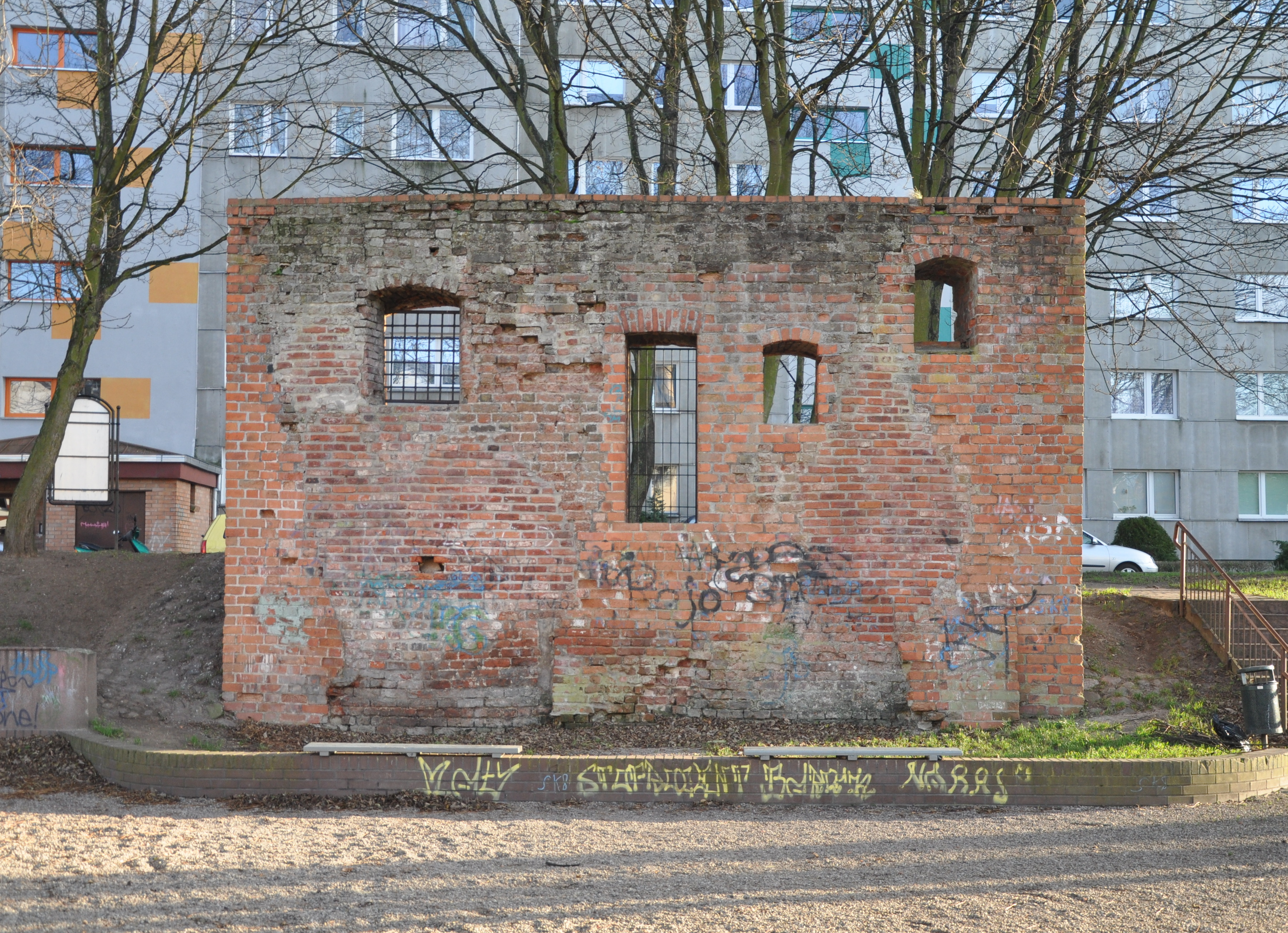 Baszta Więzienna w Kołobrzegu – ujęcie od północnego zachodu